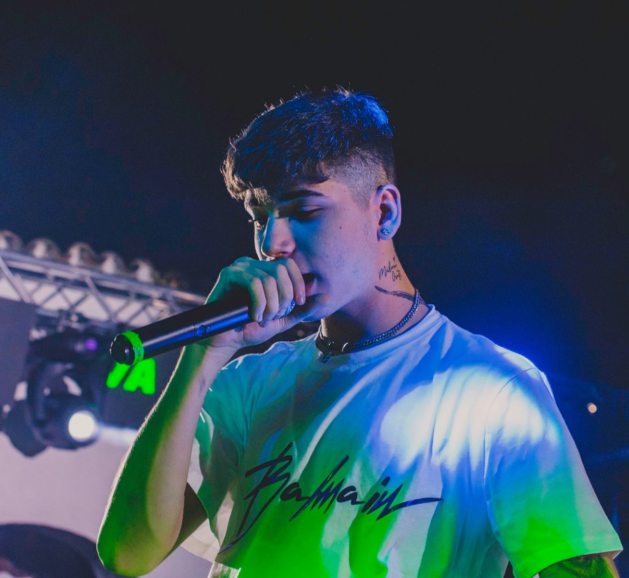 Shiva ad un suo live